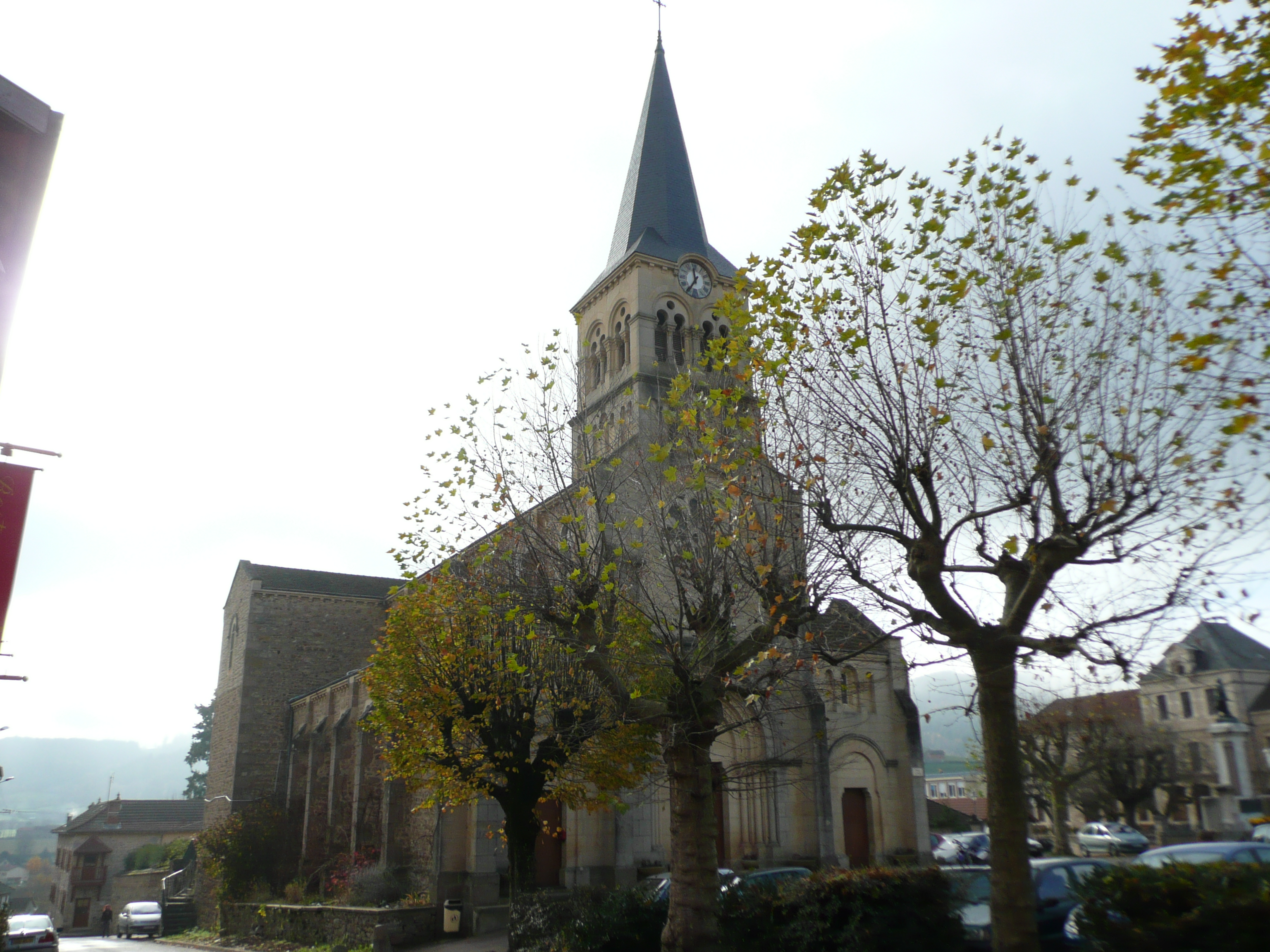 Église de Matour (Saône-et-Loire, France)